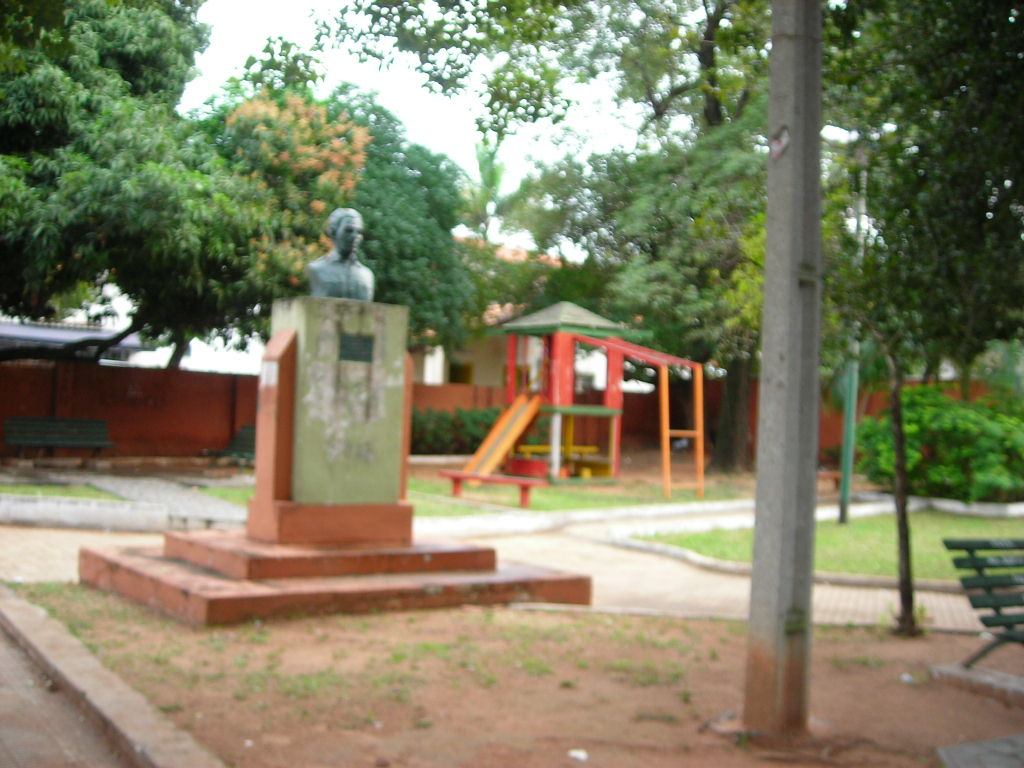 plaza Virgen del Huerto (Asunción)